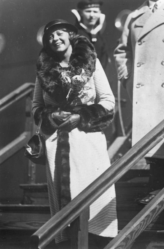 Mady Christians, der bekannte deutsche Filmstar, geht nach Amerika ! Mady Christians kurz vor ihrer Abreise in Hamburg.